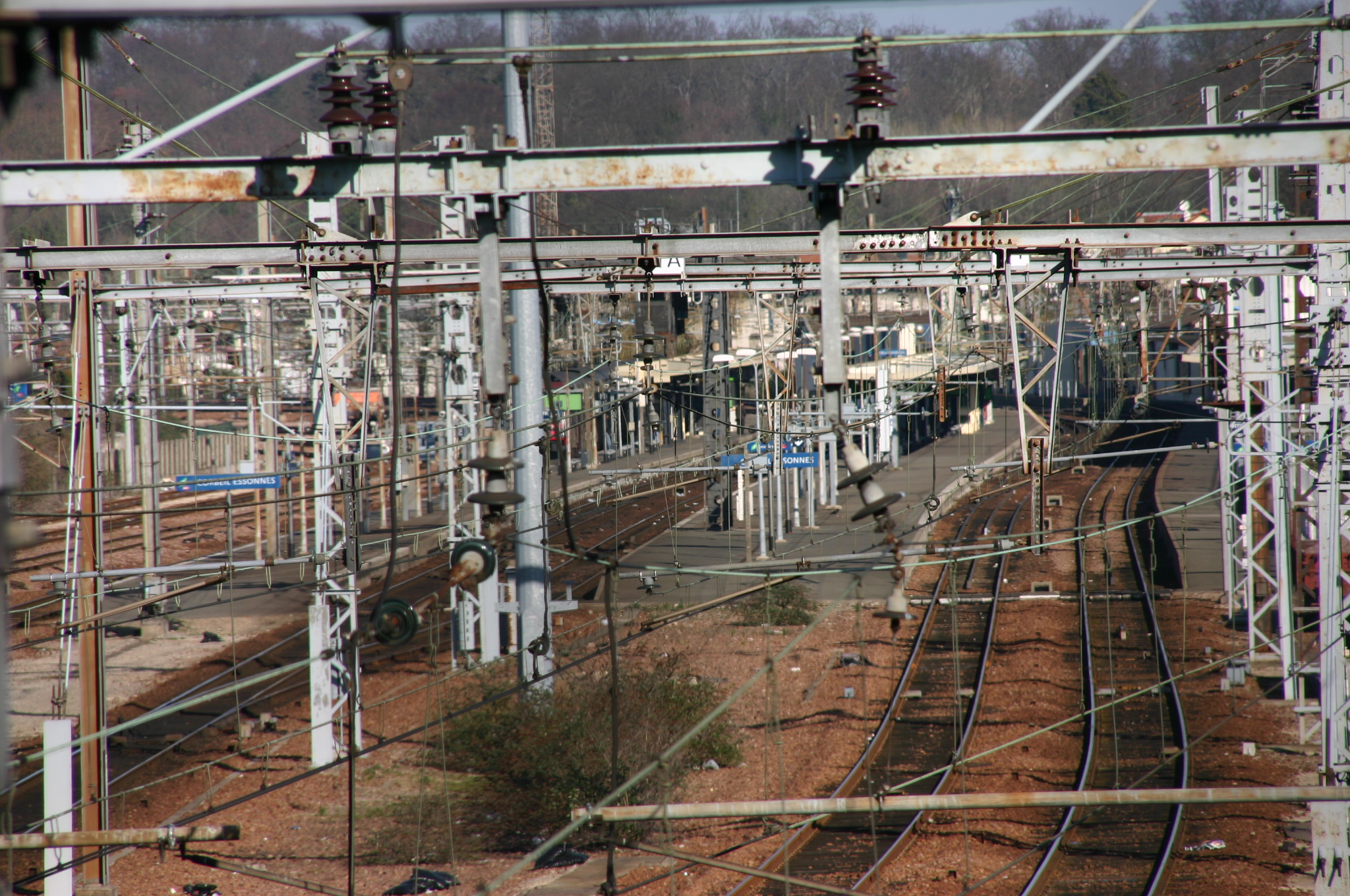 La gare de Corbeil-Essonnes, Corbeil-Essonnes, département de l'Essonne (France)